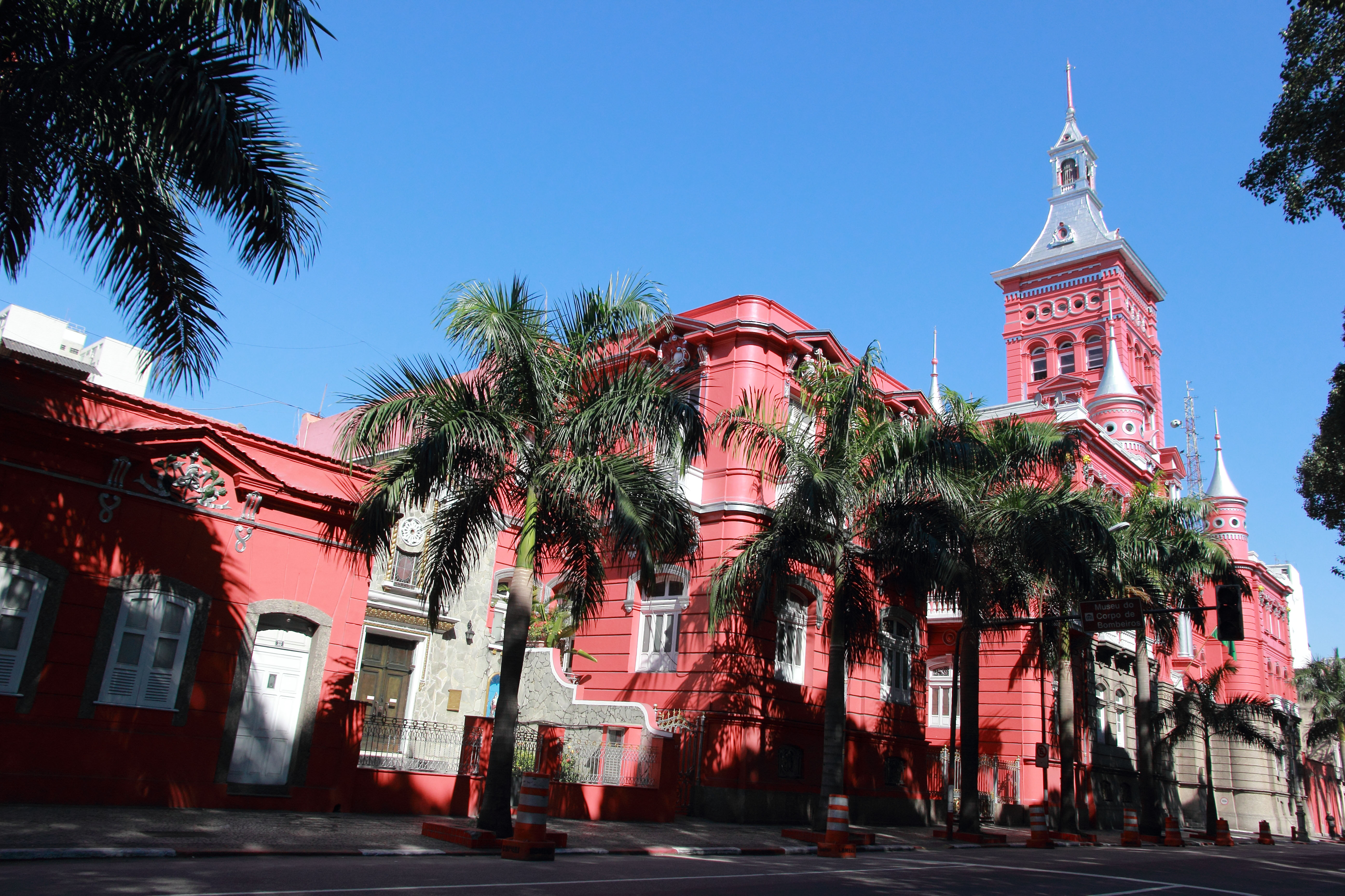 Quartel do Comando Geral do Corpo de Bombeiros - CBMERJ - Praça da República - Rio de Janeiro.